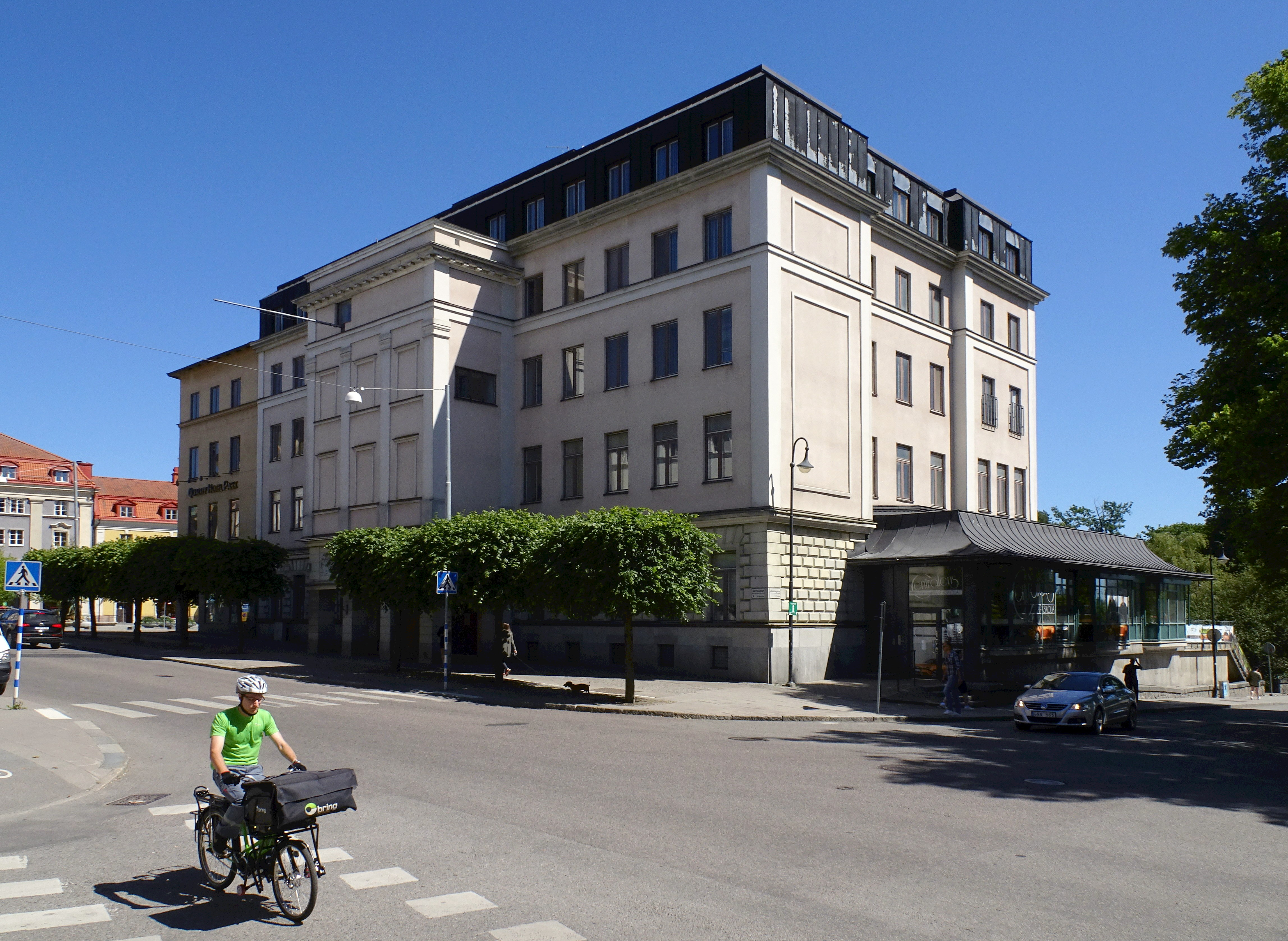 F.d. Södertälje Stadshotell idag Quality Hotell, arkitekt Ernst Haegglund, Tore E:son Lindhberg (1889)